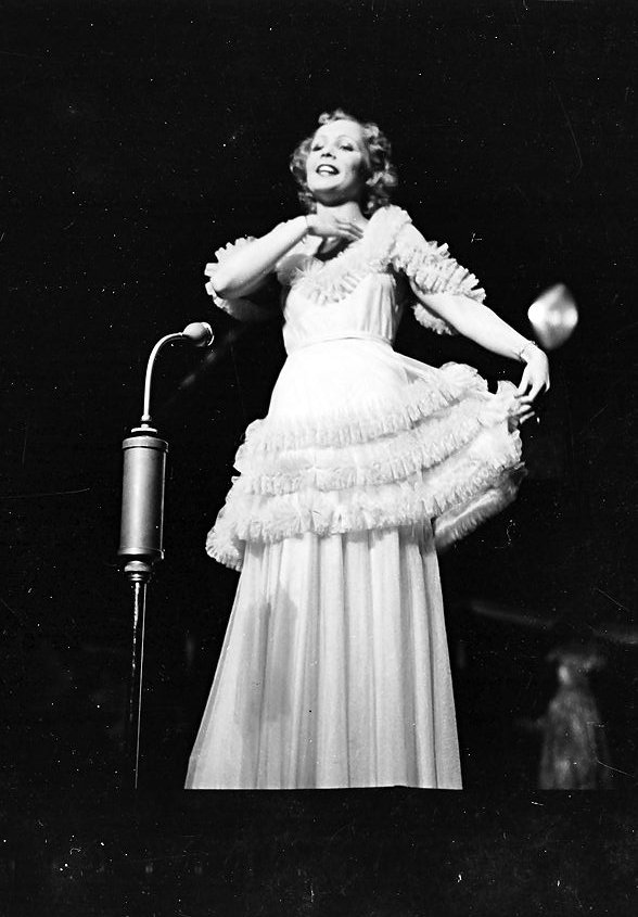 Scala (Berlin): Dinah Grace vor dem Mikrophon